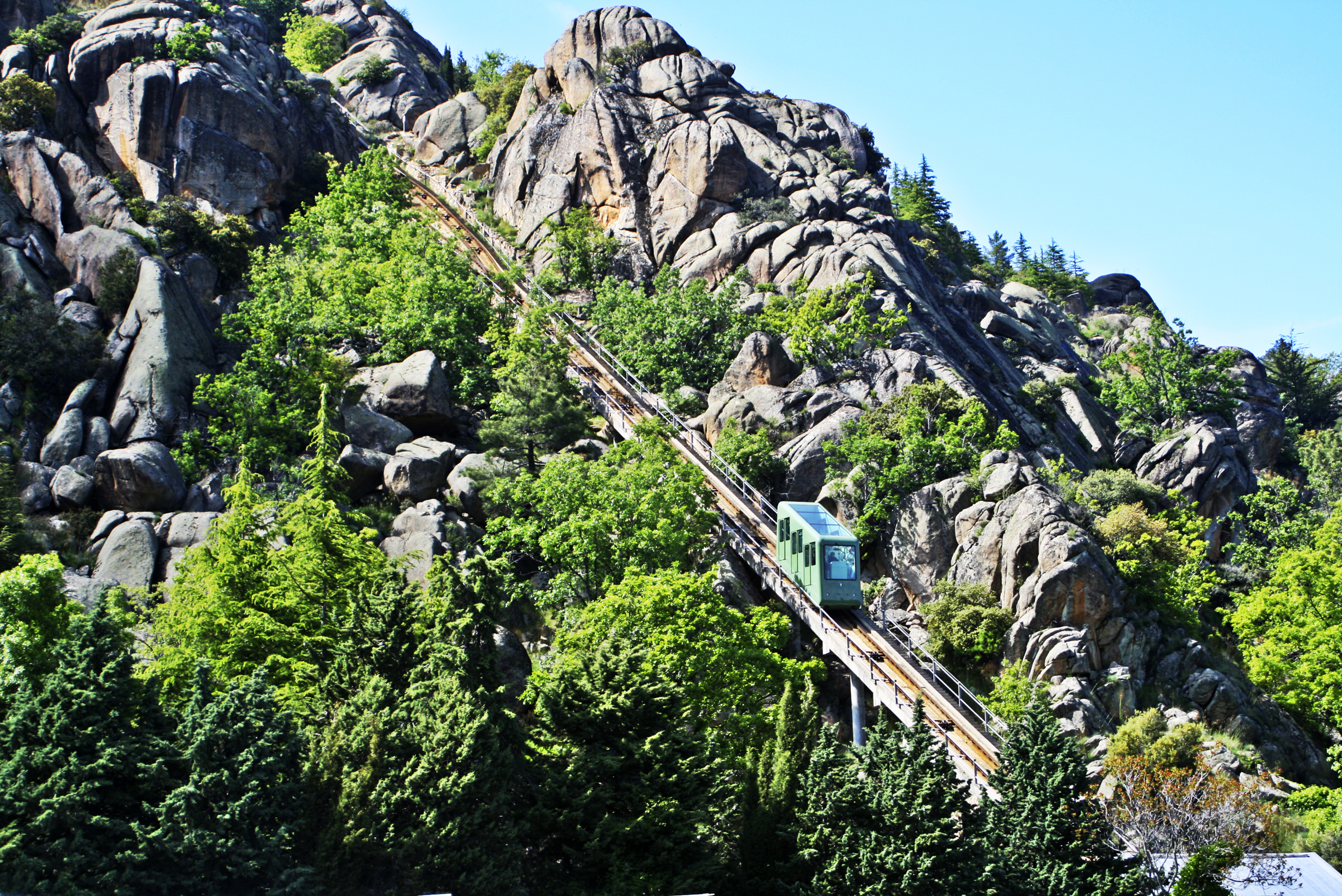 Valle de los Caídos